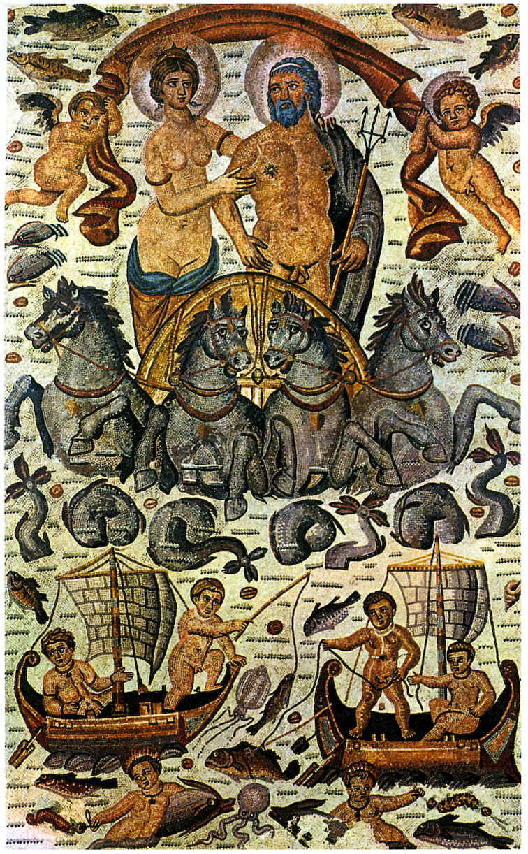 Neptune et Amphitrite, dieu et déesse de la mer.